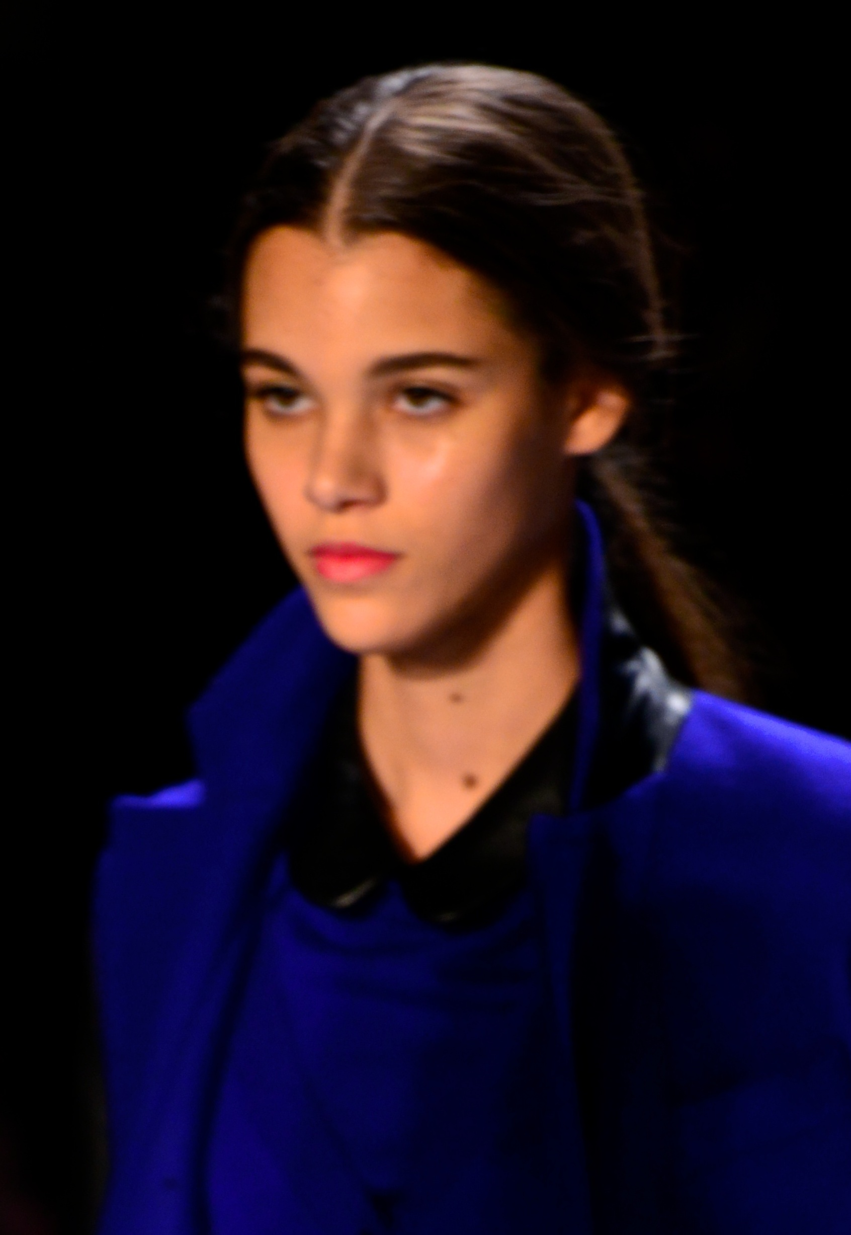 Pauline Hoarau et un autre mannequin défilant lors de la semaine des défilés de New York